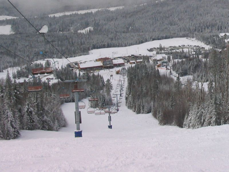 Duo de télésièges, station de ski Le Valinouët, Québec, Canada